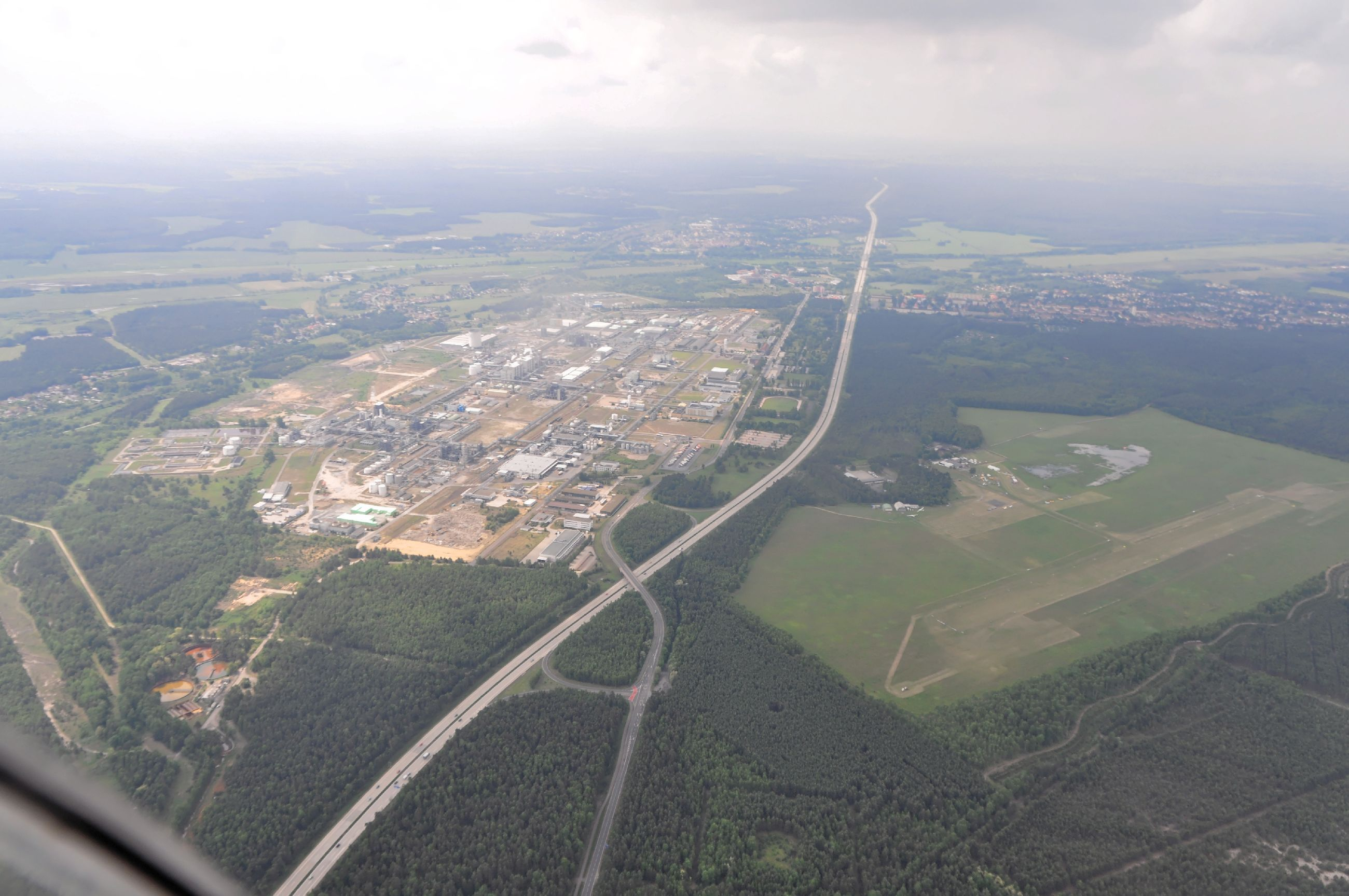 Bilder von den Lausitz Luftsport- & Techniktage 2013 am Flugplatz Schwarzheide-Schipkau